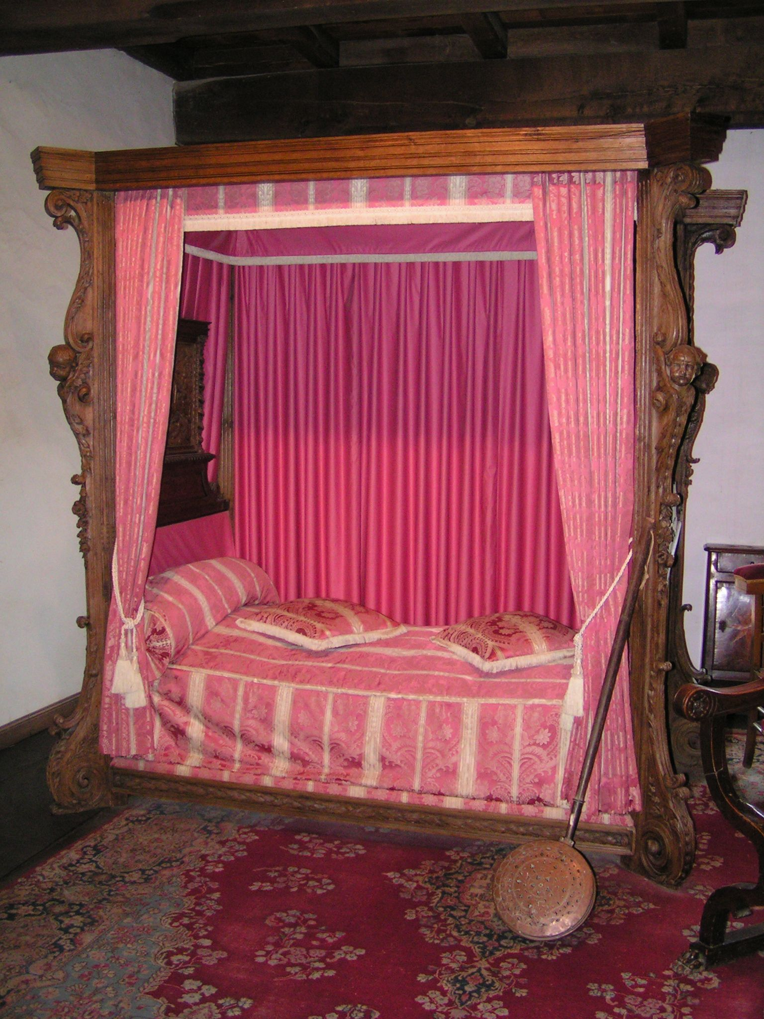 Himmelbett, Bettvorhänge, Bettwärmer auf Burg Vianden, Luxemburg. *Copyright Status: GNU-FDL Freie Dokumentationslizenz